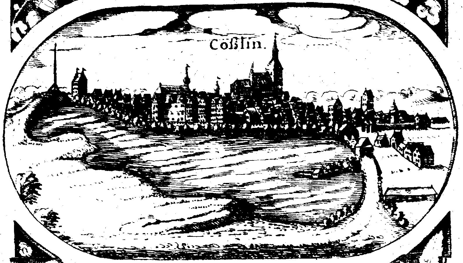 Grafika z powstałej w latach 1610-1618 mapy Lubiniusa przedstawiająca miasto Koszalin. Grafika ta jest najstarszym widokiem miasta zachowanym w archiwach.